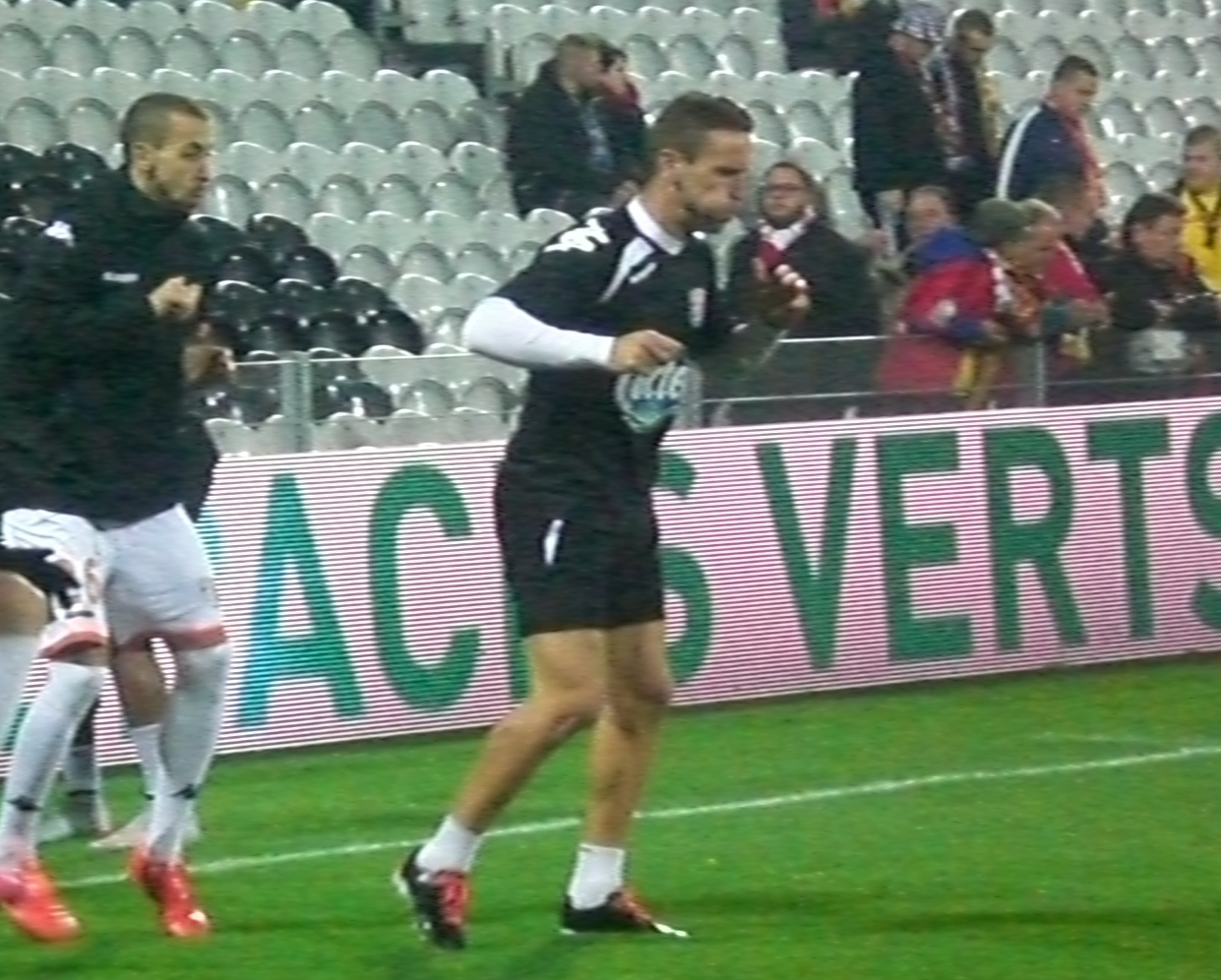 Anthony Gonçalves avant le match RC Lens / Stade Lavallois, comptant pour la onzième journée du Championnat de France de football de Ligue 2, le 19 octobre 2015, au Stade Bollaert Delelis